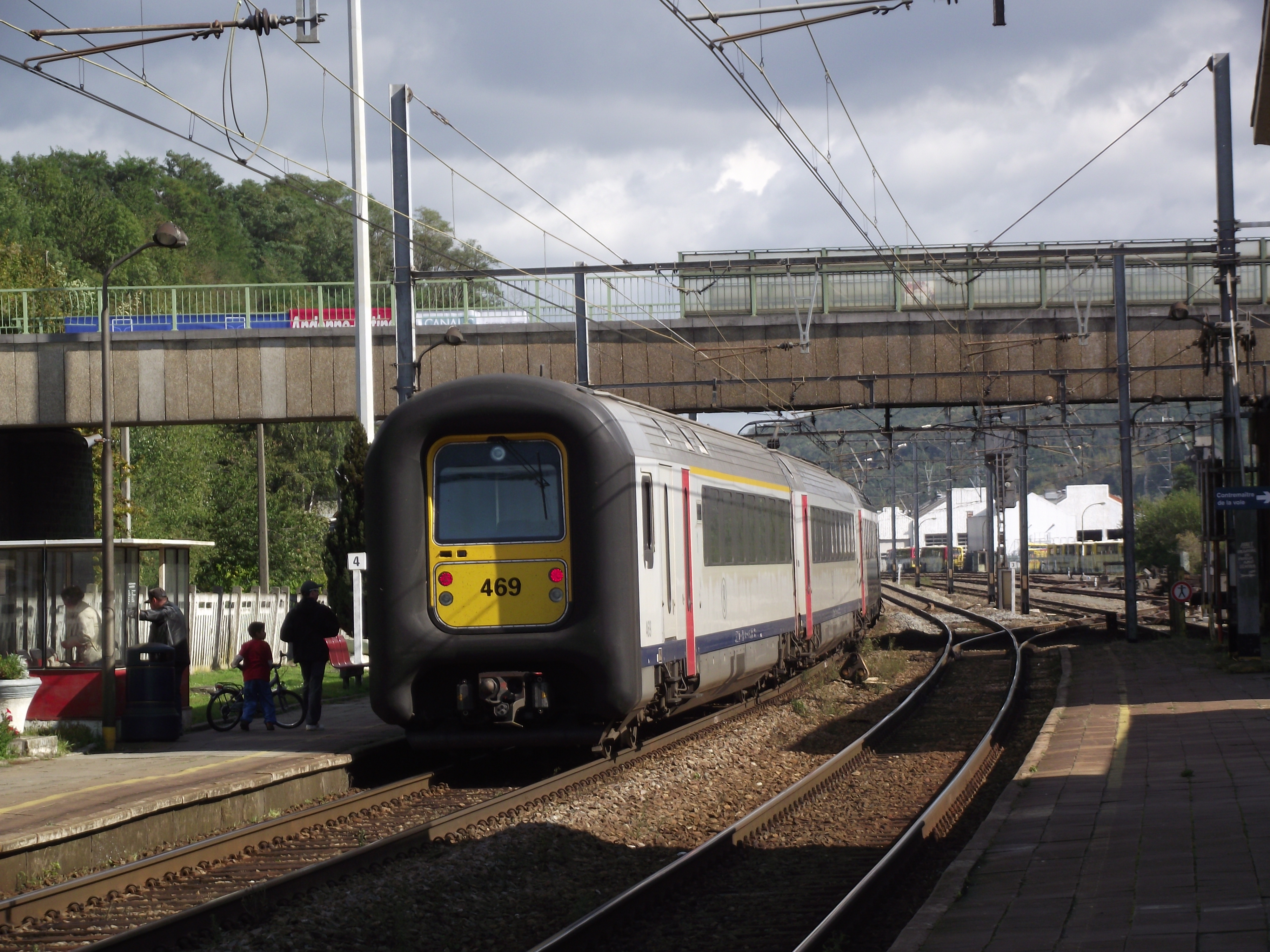 AM 96 treinstel in Andenne station vertrekt.